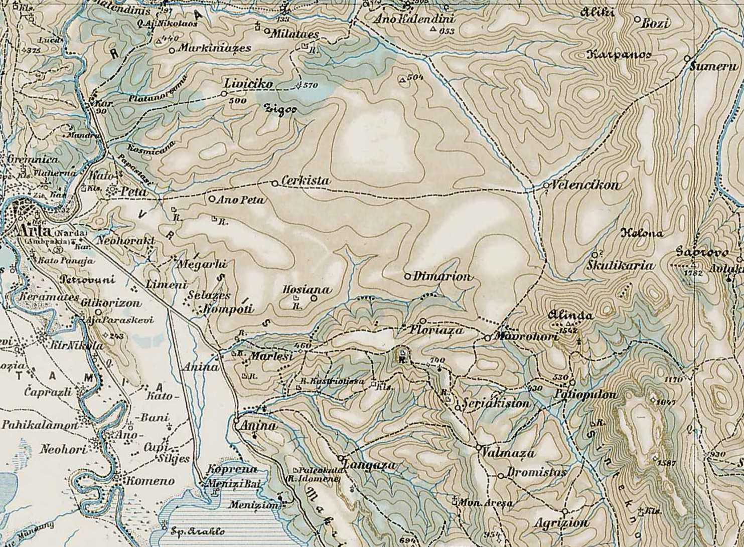 Τμήμα του νομού Άρτας σε Αυστριακό χάρτη του 1887.